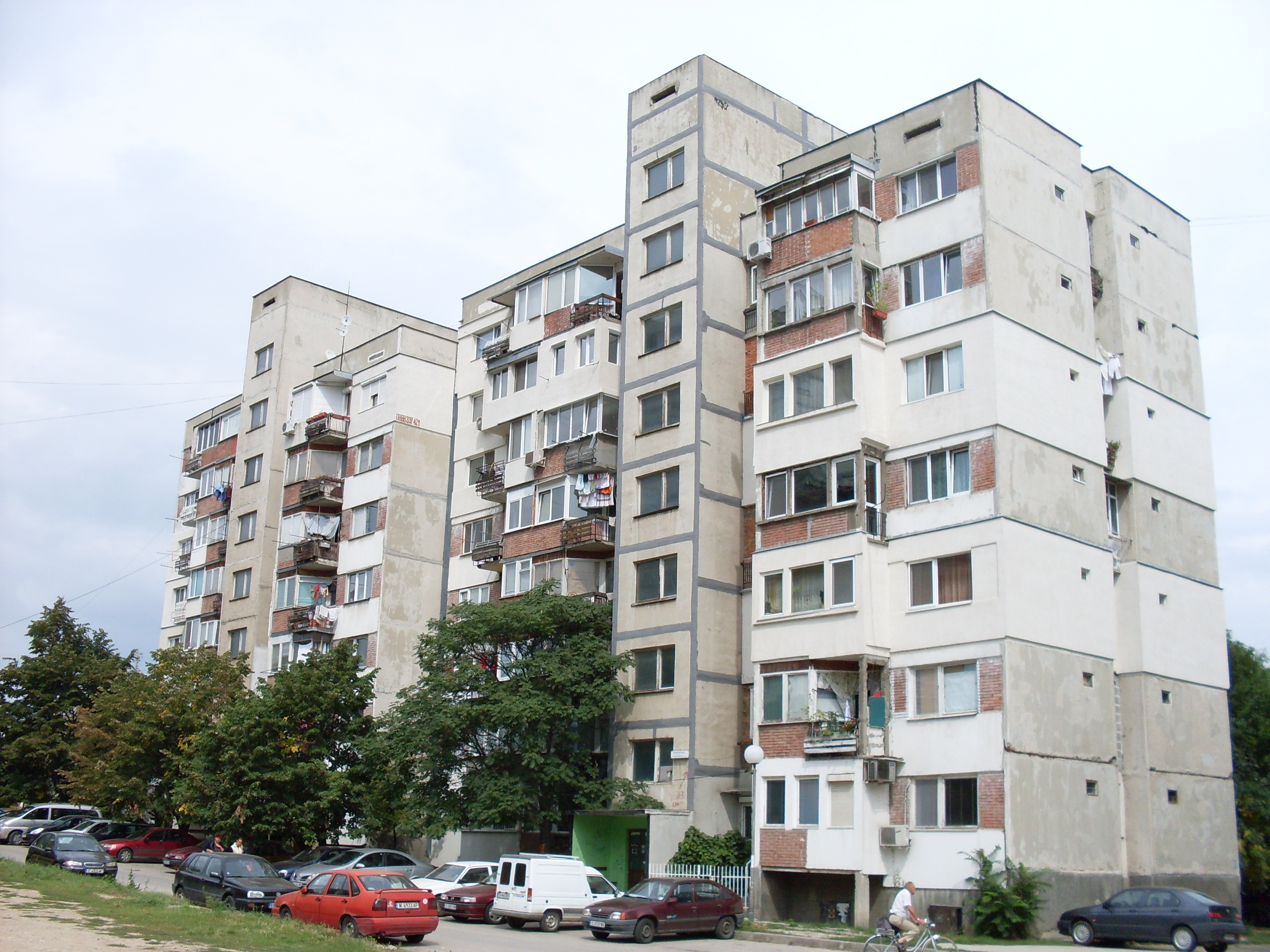 Жилищна сграда по номенклатура Ос-68-Гл - новобрачни семейства. Предна фасада.